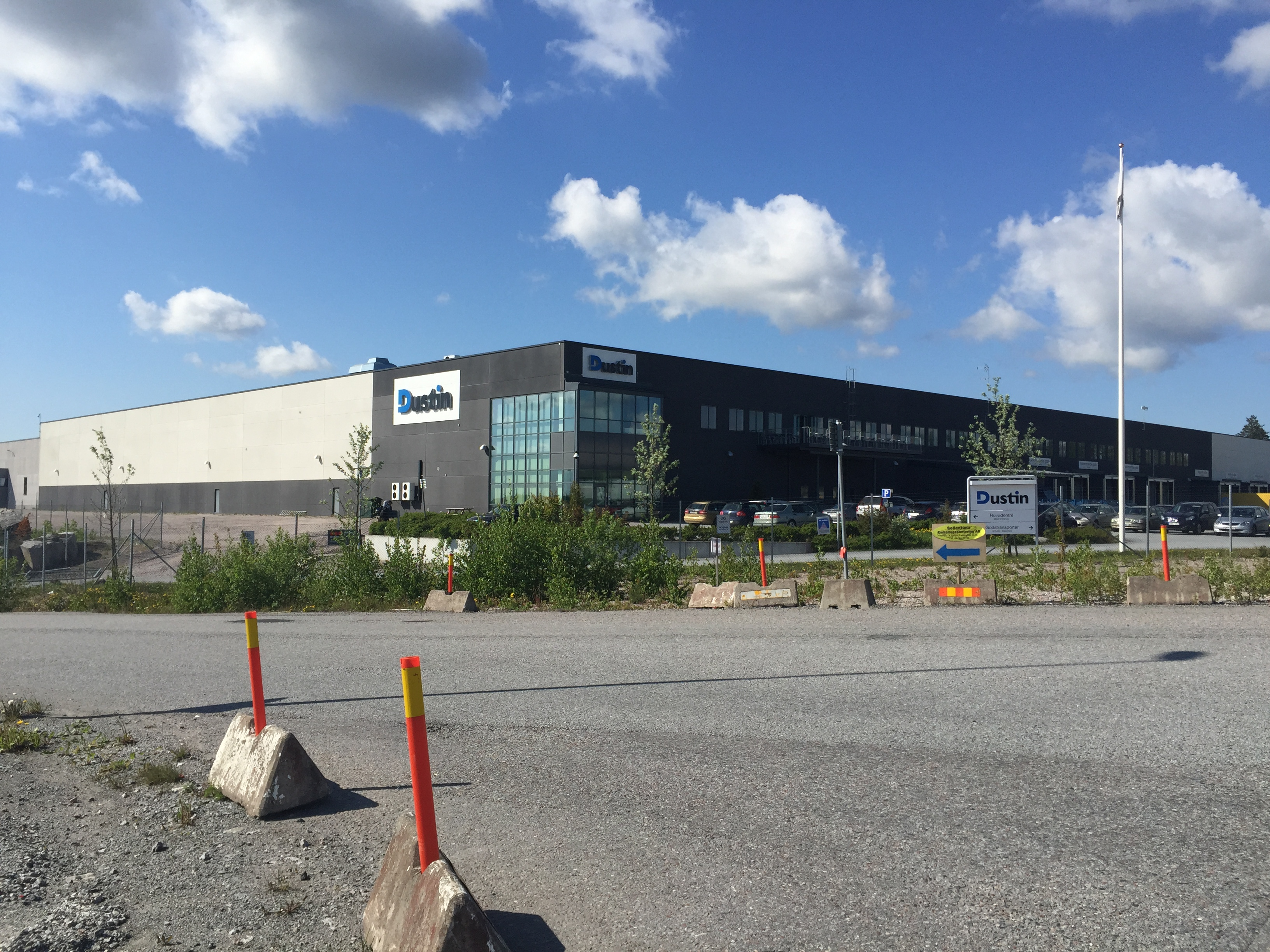 Dustin, Rosersbergs industriområde